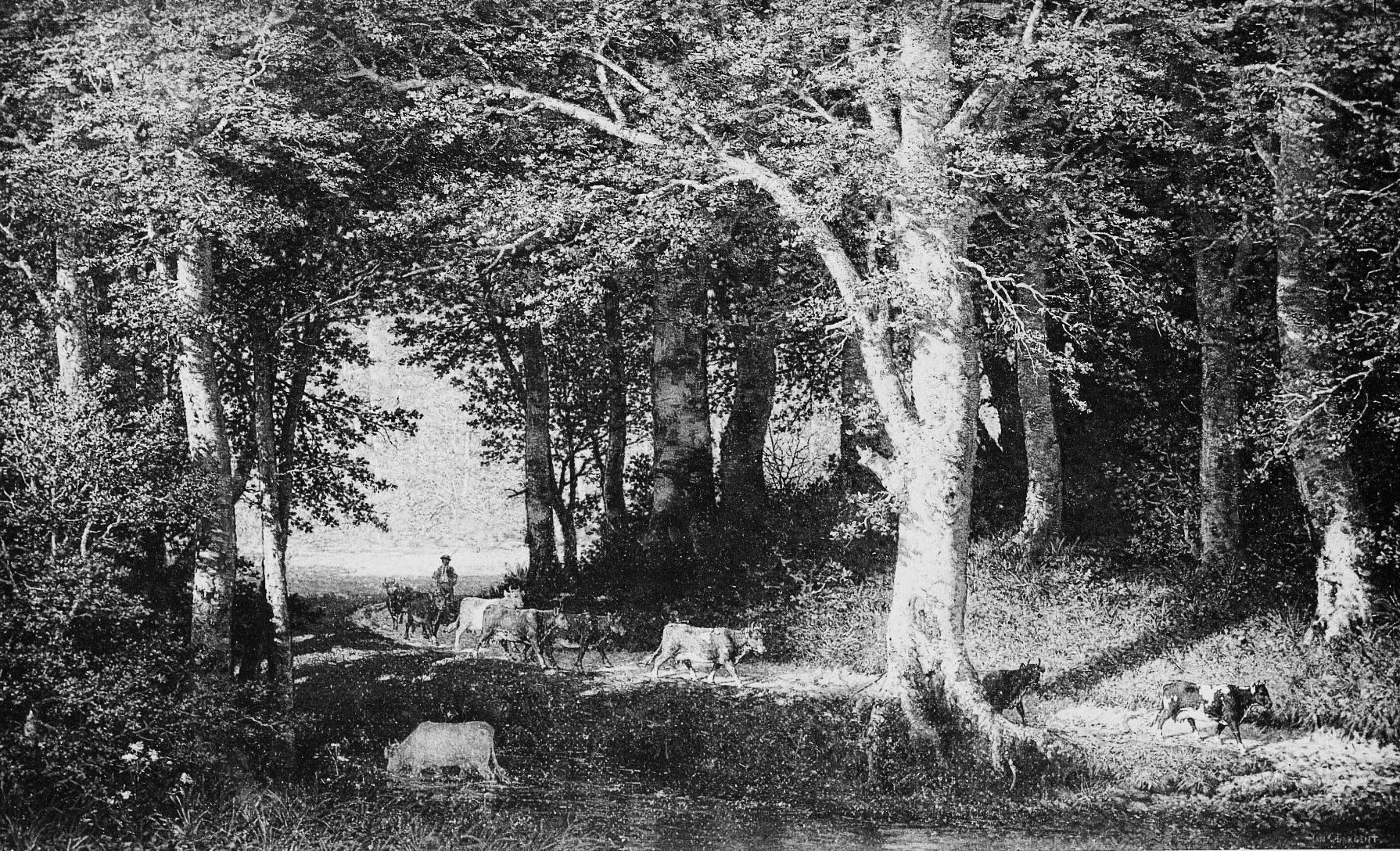 Brézal (héliogravure de Yan D'Argent, extrait de "L'Oeuvre d'Art", revue mensuelle illustrée du 20 novembre 1896, consultable